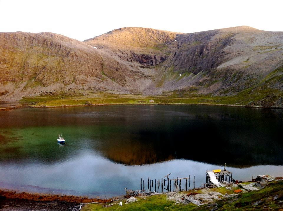 Burstad, Måsøy, Finnmark, Norway